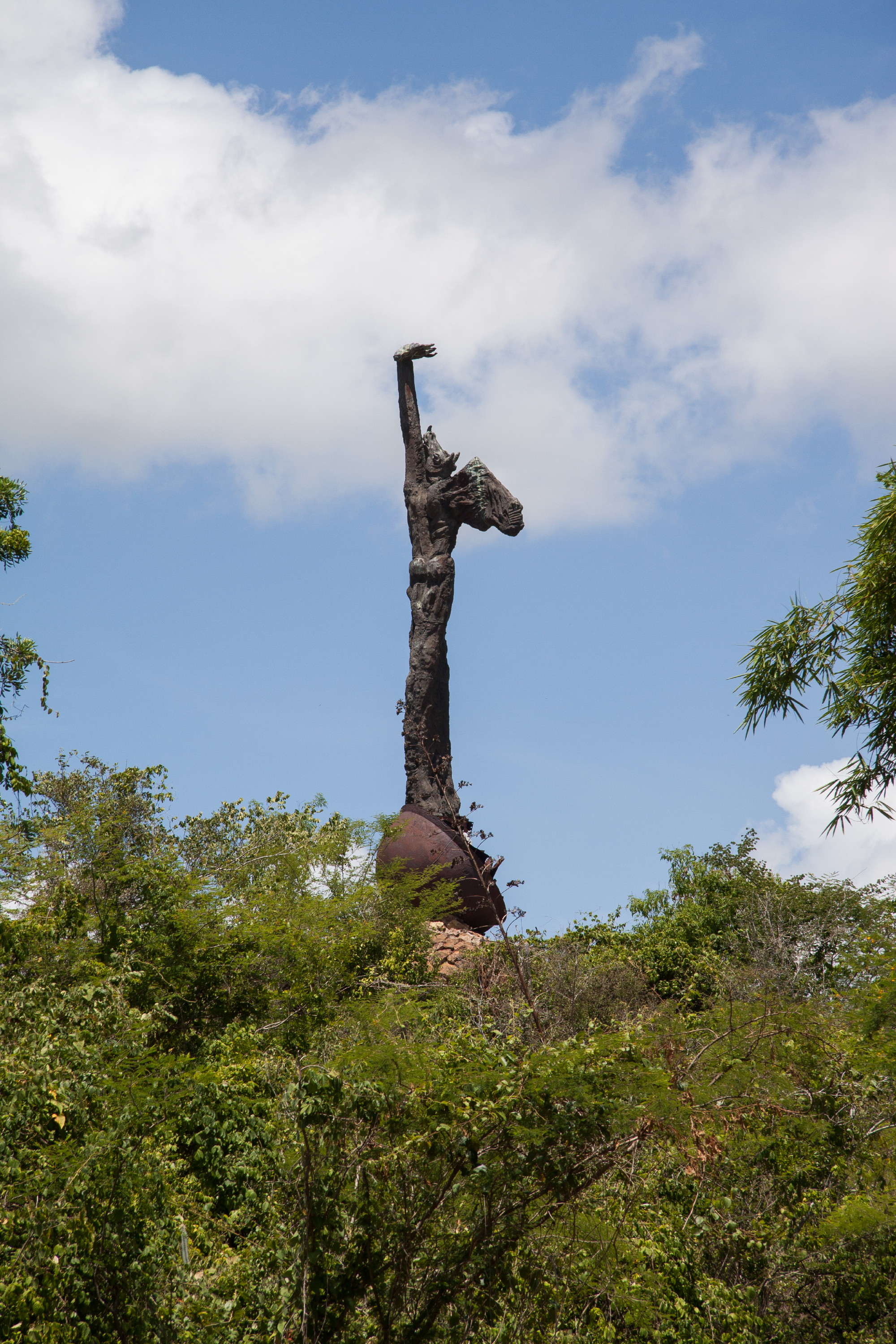 Denkmal für die entlaufenen Sklaven bei El Cobre, Santiago de Cuba